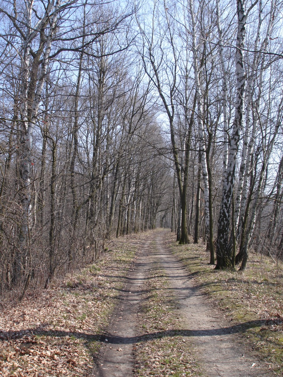 Ehemaliger Bahnkörper der Industriebahn Quoos–Crosta